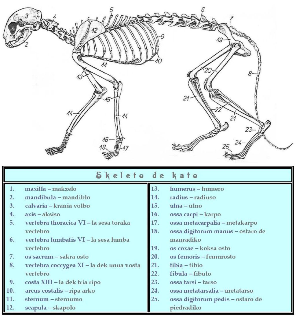 Tabelo en Esperanto pri la skeleto estas de Petro. KLARIGOJ: 1.maxilla – makzelo 2.mandibula – mandiblo 3.calvaria – krania volbo 4.axis – aksiso 5.vertebra thoracica VI – la sesa toraka vertebro 6.vertebra lumbalis VI – la sesa lumba vertebro 7.os sacrum – sakra osto 8.vertebra coccygea XI – la dek unua vosta vertebro 9.costa XIII – la dek tria ripo 10.arcus costalis – ripa arko 11.sternum – sternumo 12.scapula – skapolo 13.humerus – humero 14.radius – radiuso 15.ulna – ulno 16.ossa carpi – karpo 17.ossa metacarpalia – metakarpo 18.ossa digitorum manus – ostaro de manradiko 19.os coxae – koksa osto 20.os femoris – femurosto 21.tibia – tibio 22.fibula – fibulo 23.ossa tarsi – tarso 24.ossa metatarsalia – metatarso 25.ossa digitorum pedis – ostaro de piedradiko